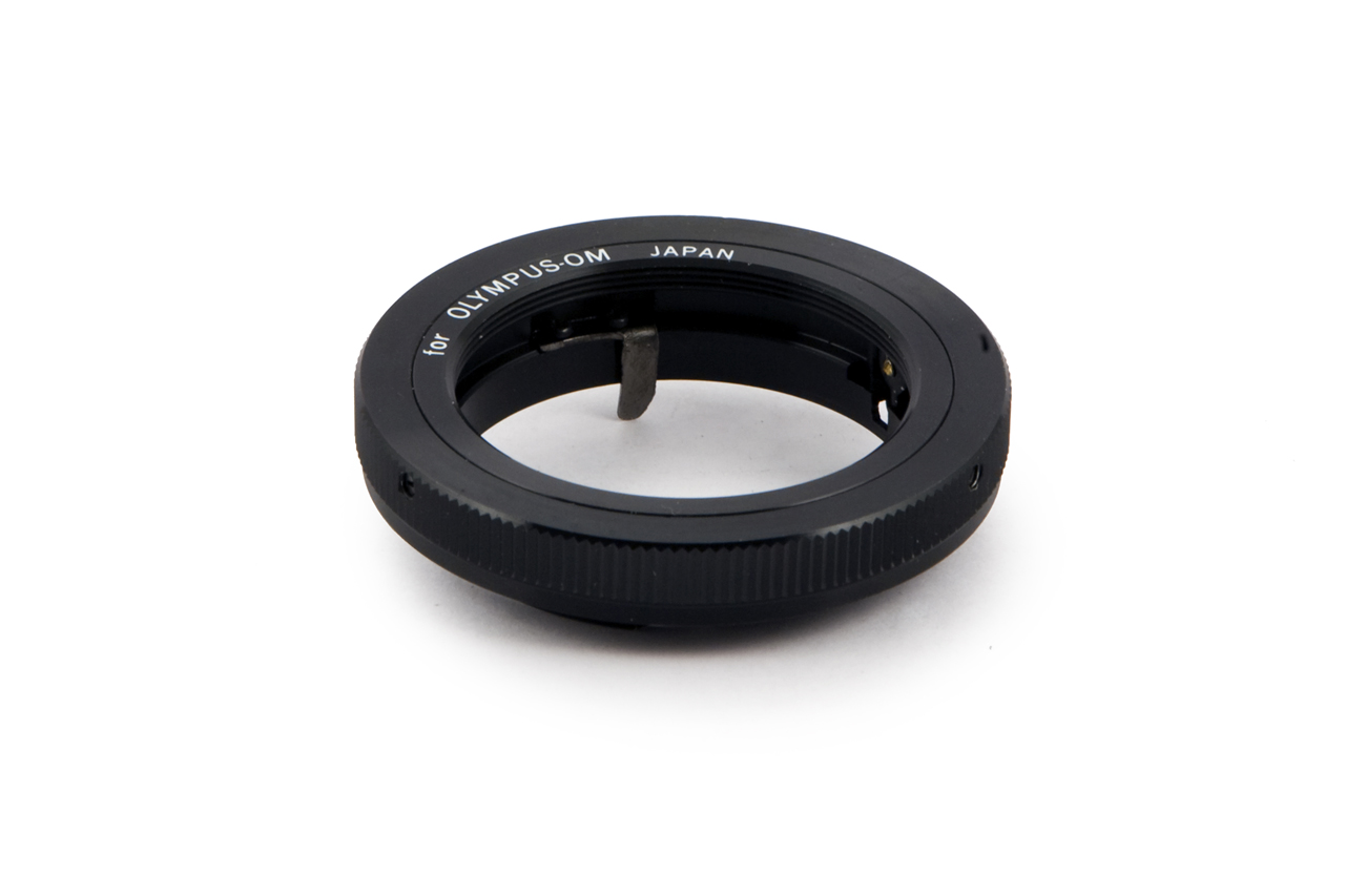 Anello in metallo con flangia per l'inserimento a baionetta su apparecchio fotografico. Dall'altro lato l'interno dell'anello è filettato per l'inserimento di un obiettivo Lateralmente è presente un pulsante di sblocco L'anello è conservato nella confezione in plastica trasparente nella quale è stato acquistato. All'interno della confezione è inserito anche un foglio illustrativo dell'oggetto con le indicazioni d'uso. Funzione Collegamento di diversi obiettivi con innesto filettato di diametro 42mm ad apparecchio fotografico Olympus OM con attacco a baionetta. Modalità d'uso Inserire l'anello nell'attacco a baionetta dell'apparecchio fotografico e avvitarvi l'obiettivo.